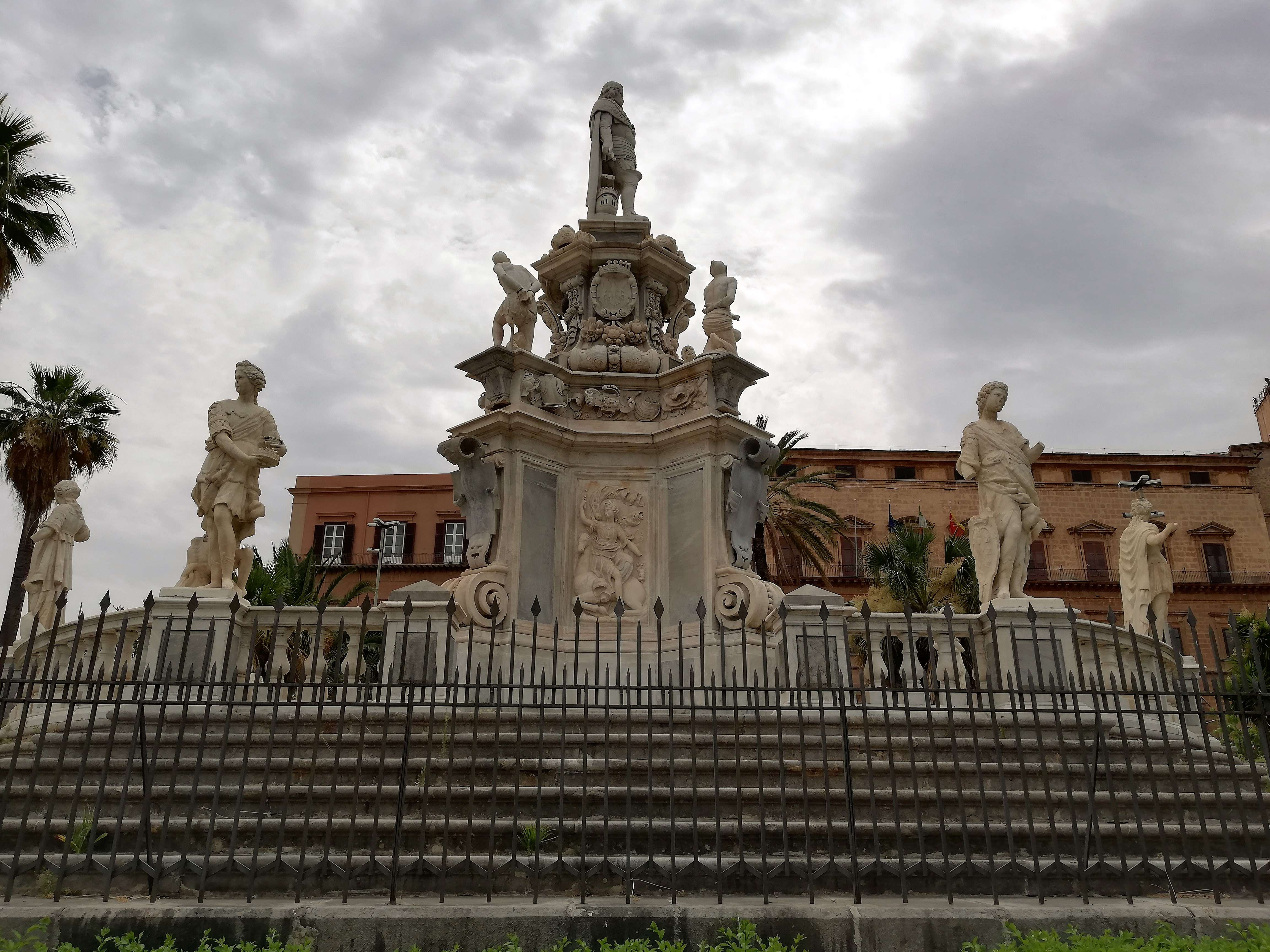 Basamento e fianco orientale col Palazzo dei Normanni sullo sfondo.